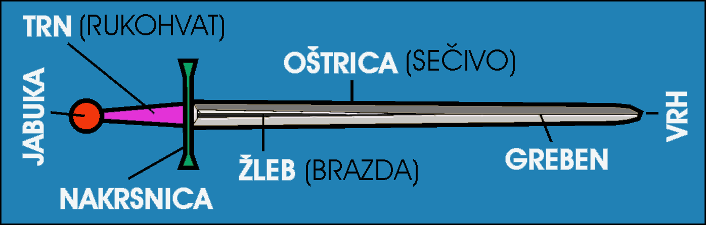 Djelovi mača.